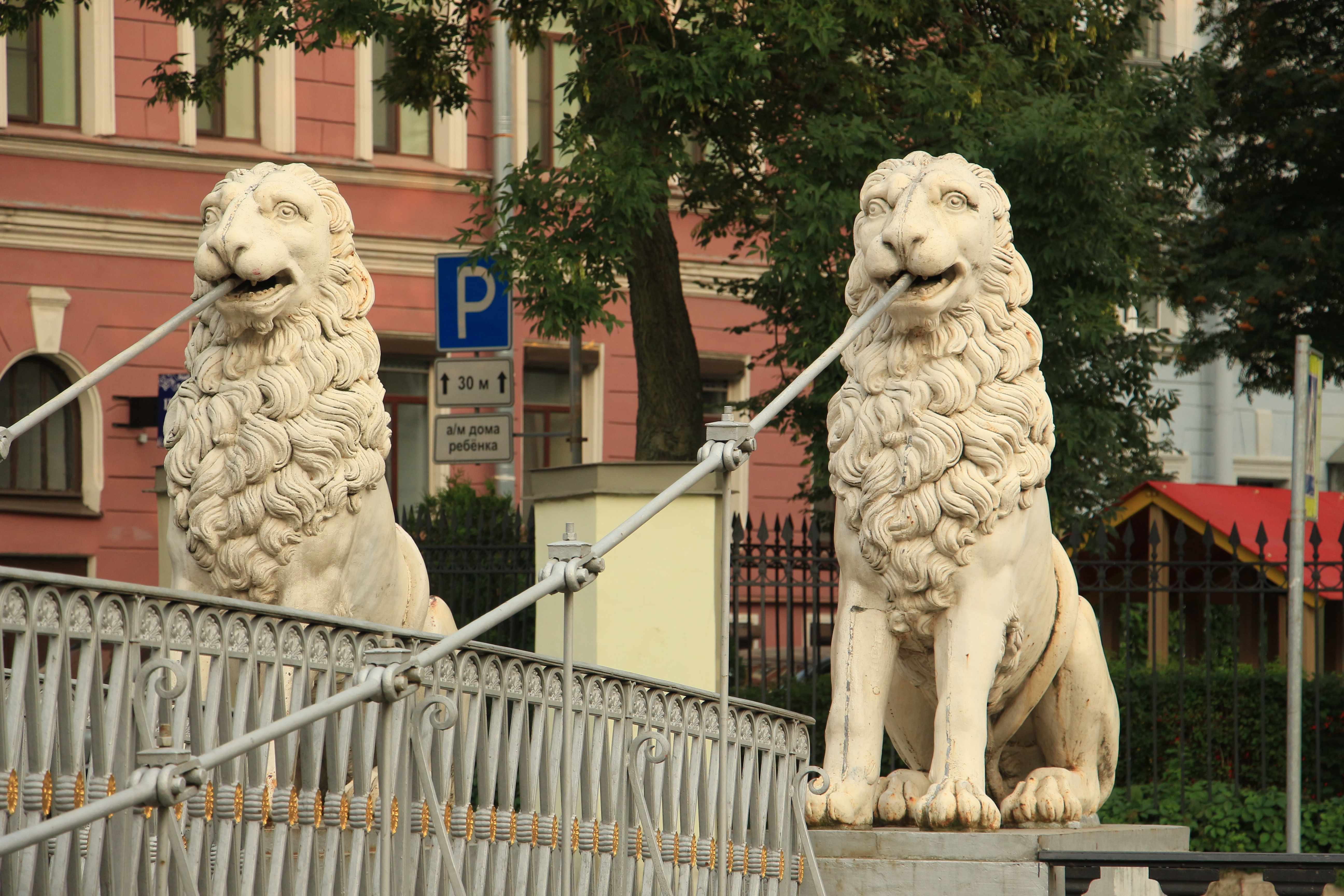 Львиный мост: через канал Грибоедова, напротив Малой Подьяческой улицы, Адмиралтейский район, Санкт-Петербург